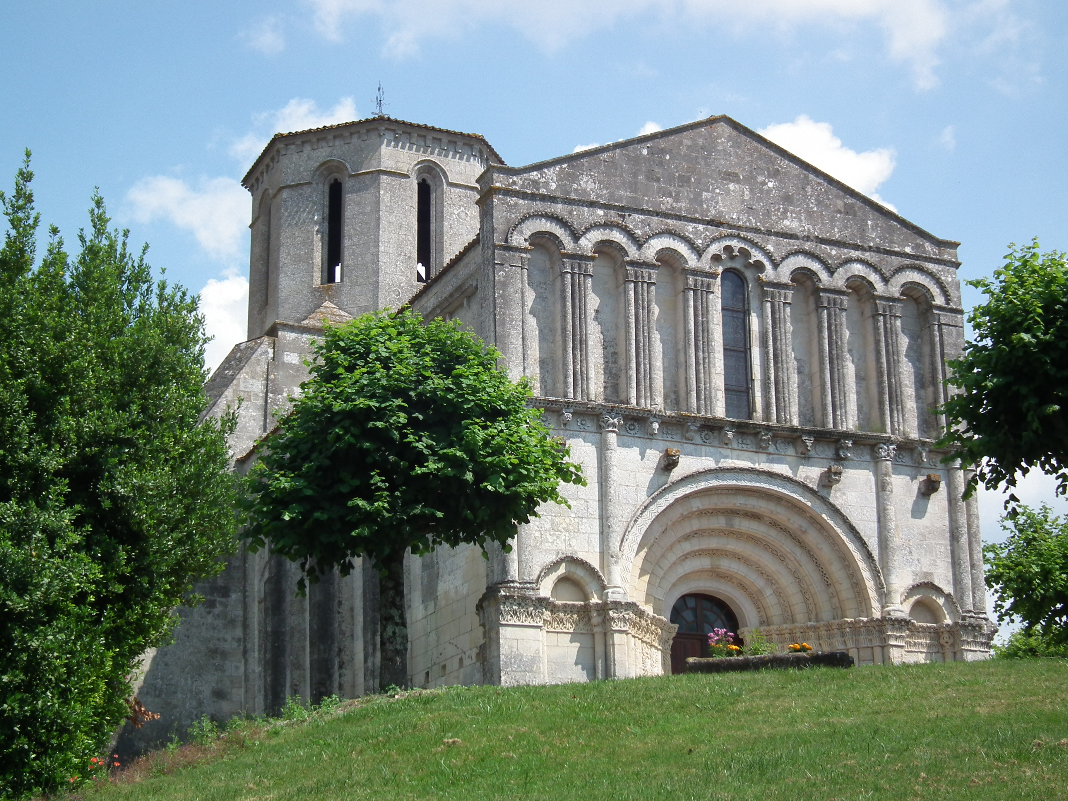 L'église romane d'Echebrune